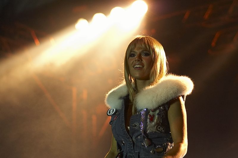 Doda